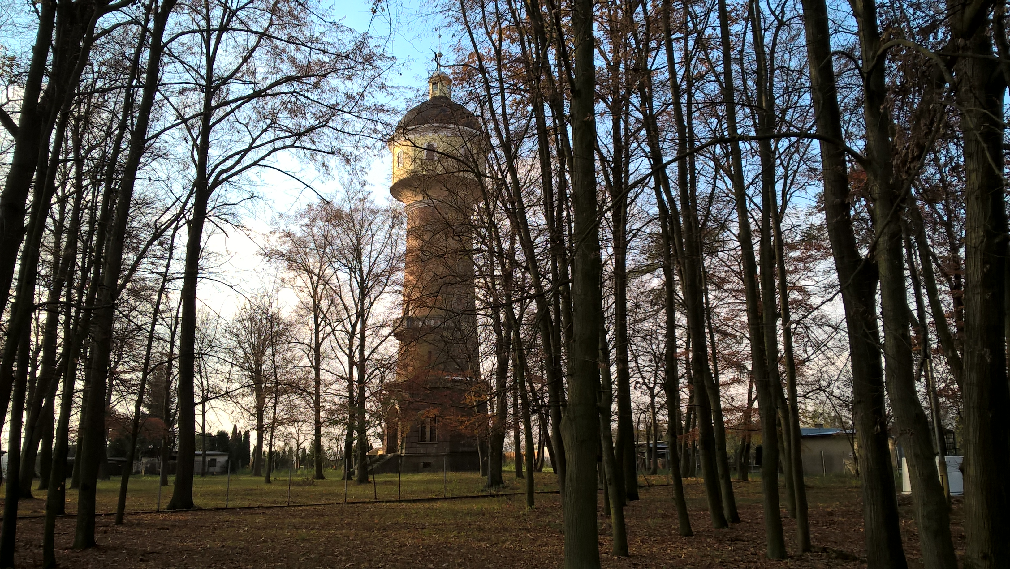 Budynek dawnej wieży wodnej w Szamotułach